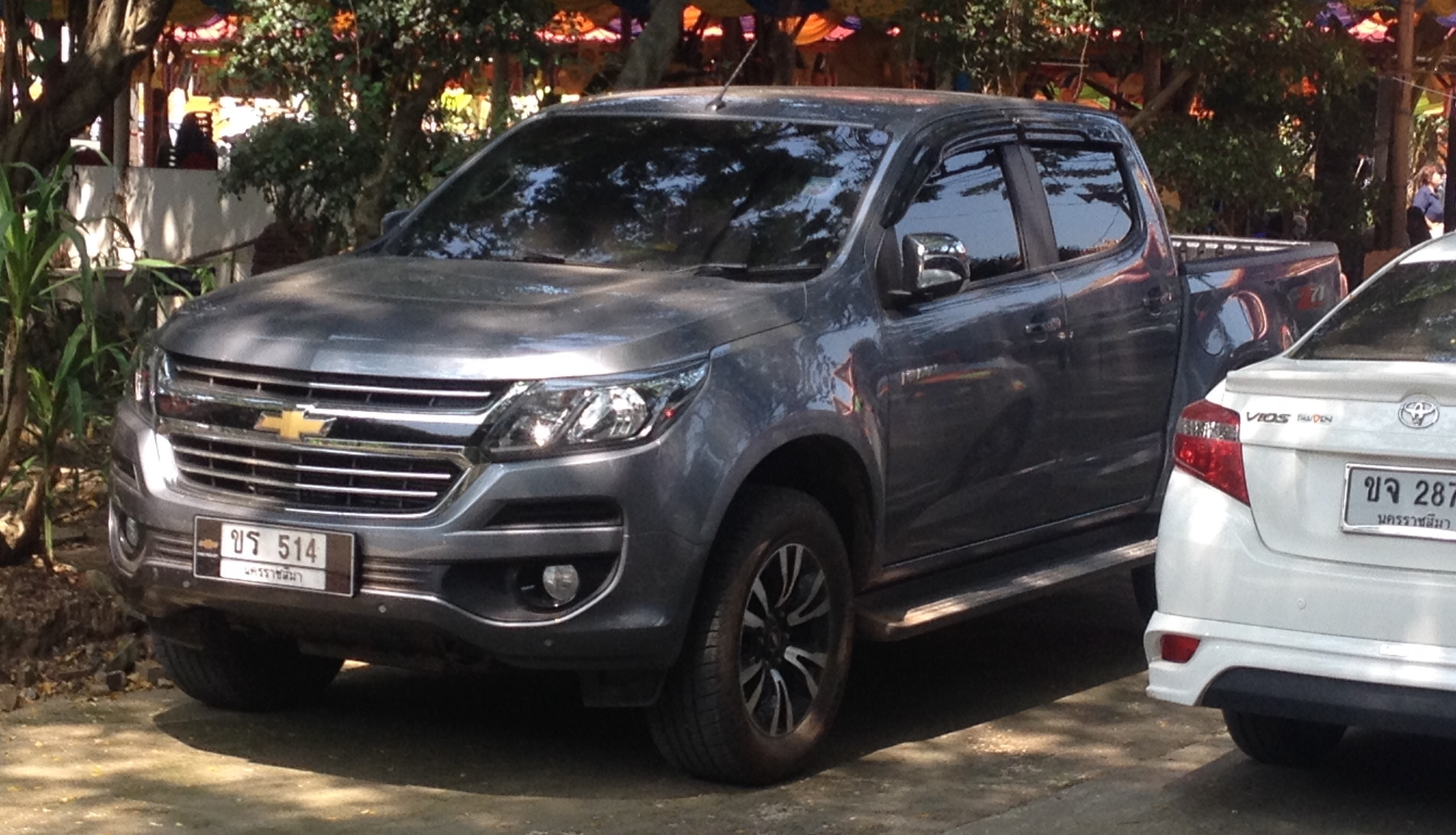 เชฟโรเลต โคโลราโด รุ่นปรับโฉม